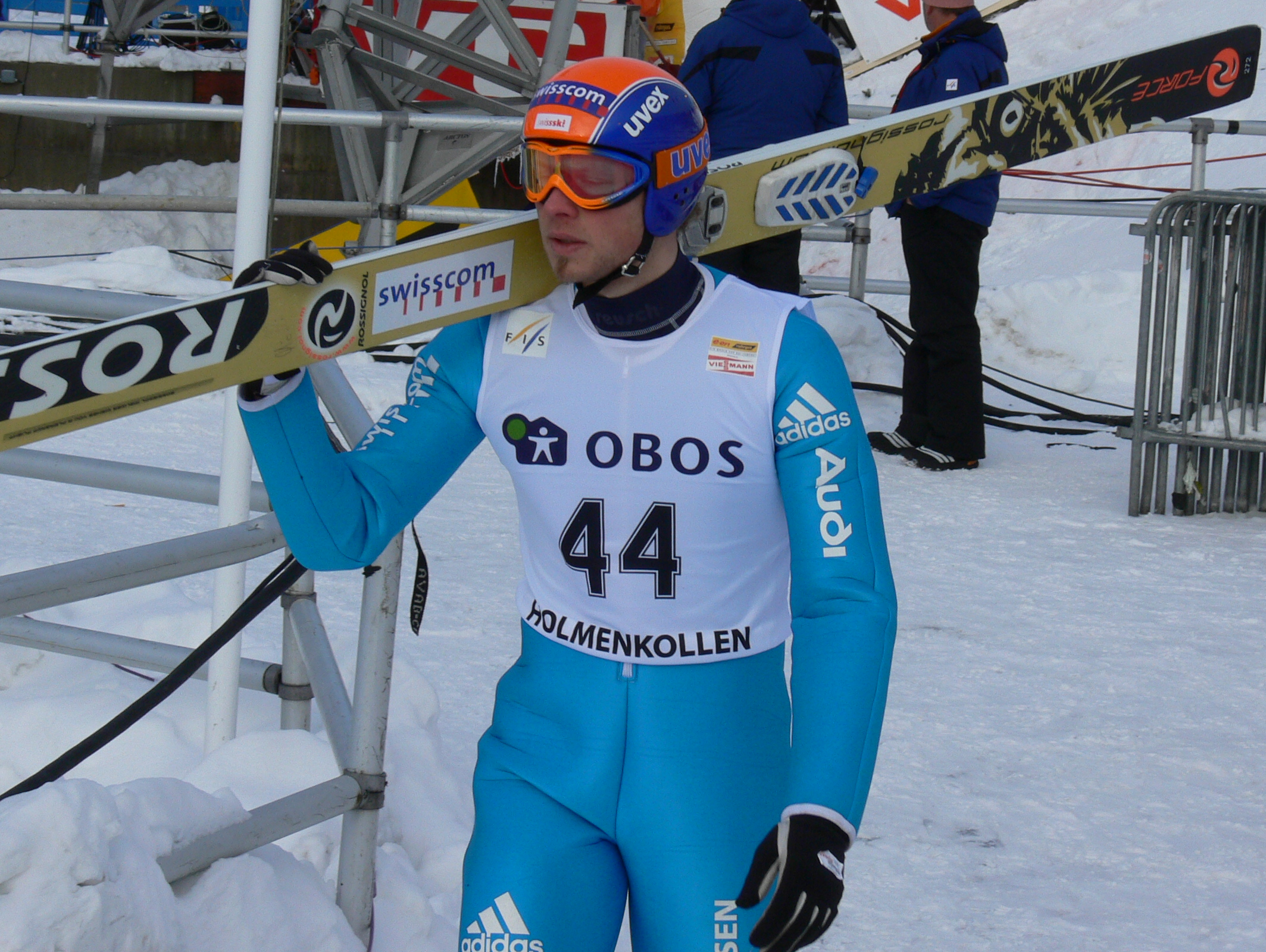 Taken at the annual ski jumping event in Holmenkollen in 2006.